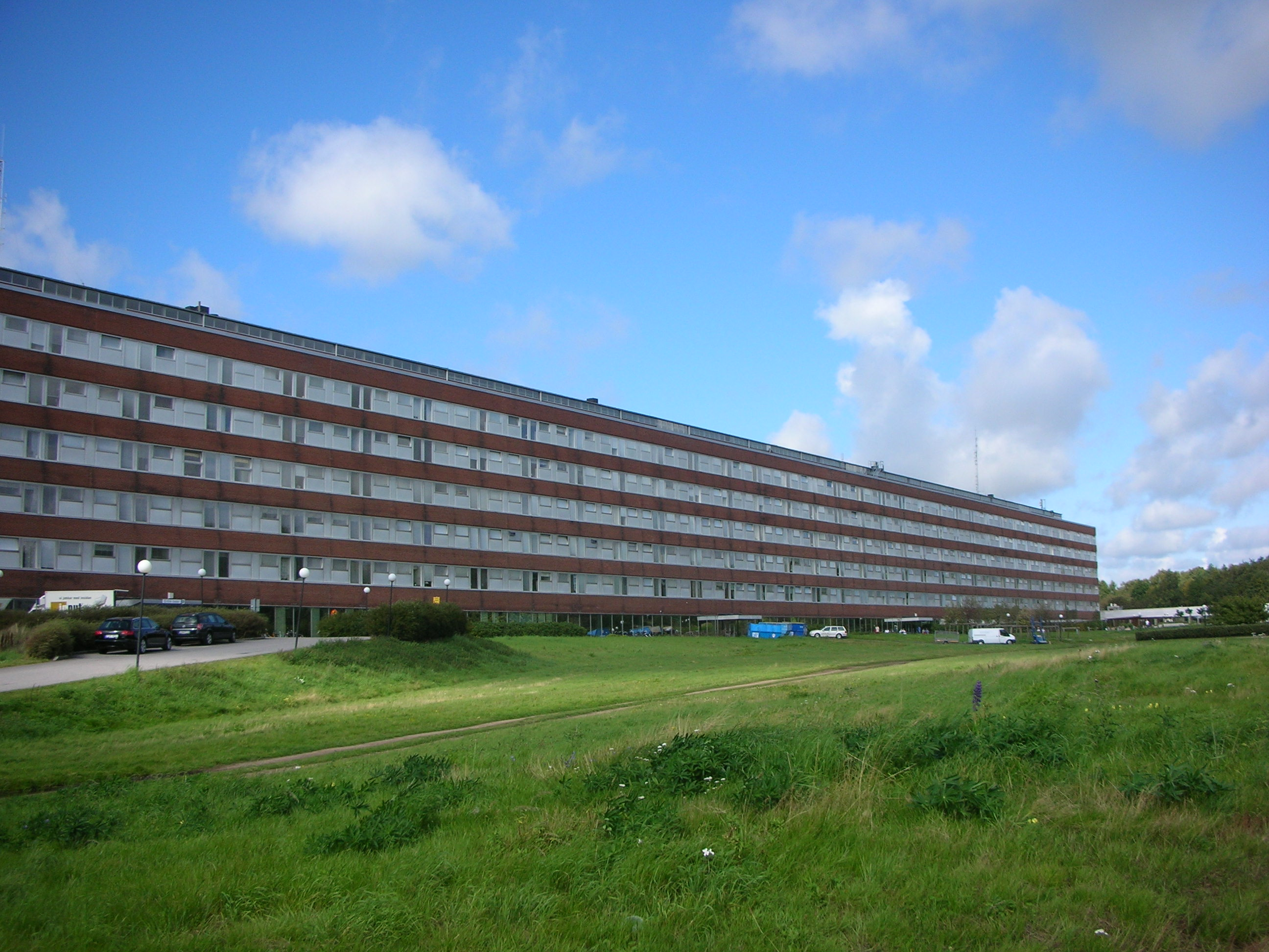 Sjukhuset i Varberg